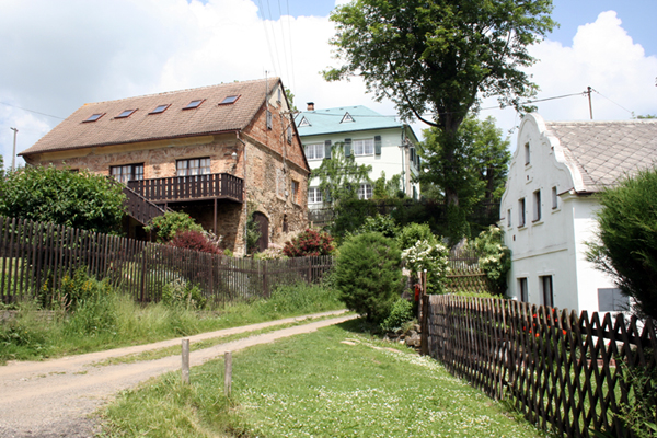 Dobrá Voda u Toužimi, Karlovarský kraj, Česká republika. Vpravo če. 5, vlevo čp. 36, v pozadí čp. 10.